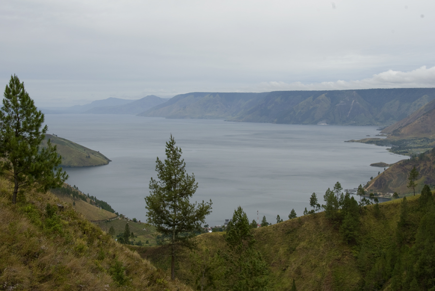 Вид на озеро Тоба и остров Самосир (A view of Lake Toba and Samosir island)